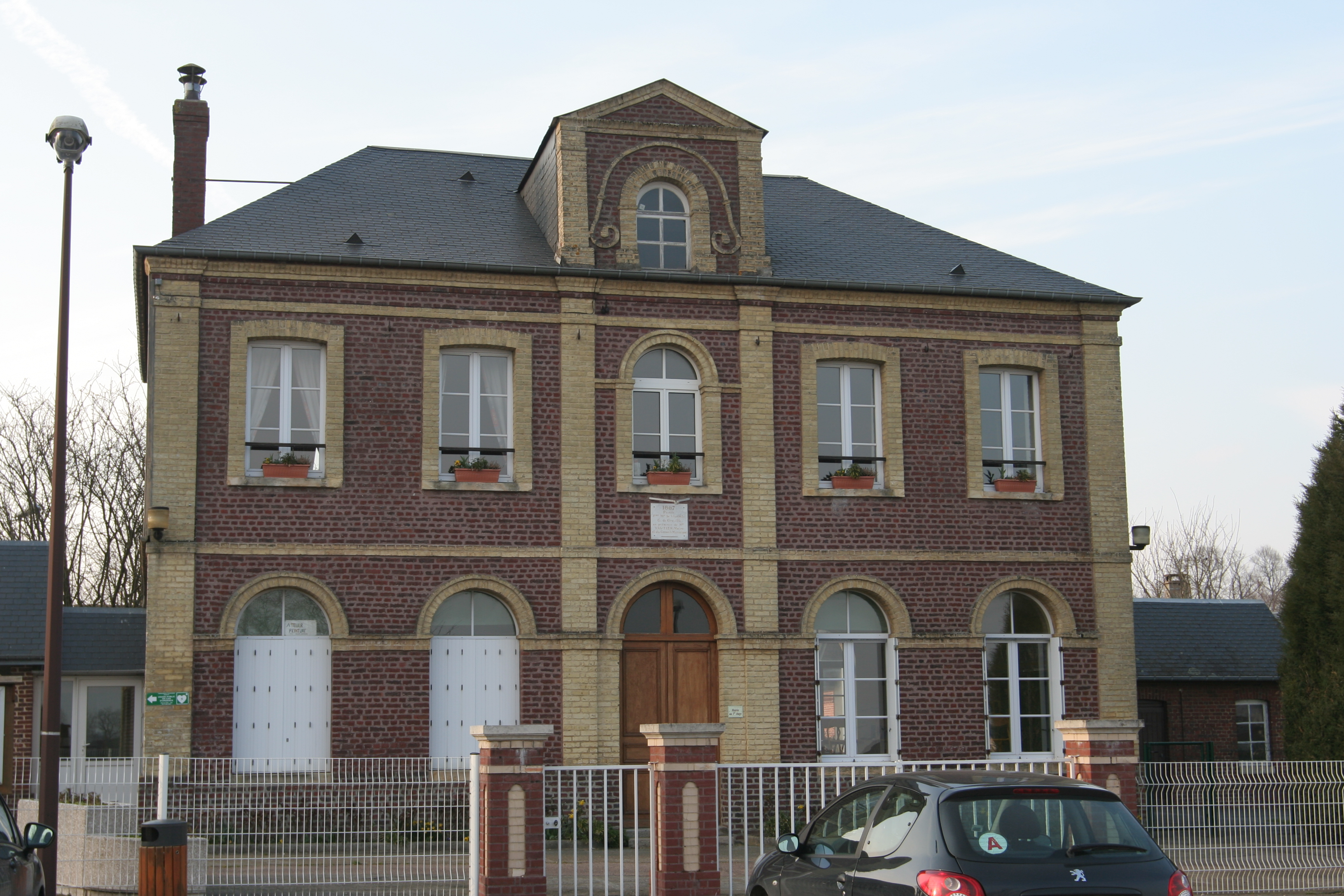 La mairie de Saint-Vincent-Cramesnil.